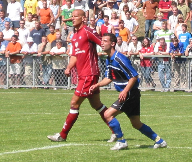 Carsten Jancker (links)